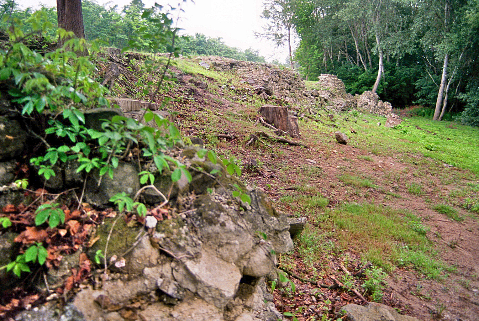 Burgus Szigetmonostor-Horány, Ungarn: Blick vom südlichen Eckturm auf das Kernwerk. Die Aufnahme wurde im strömenden Regen gemacht.